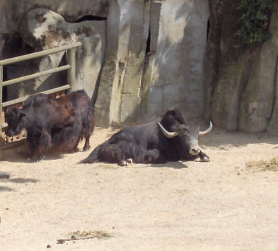 Species Bos grunniens Family Bovidae